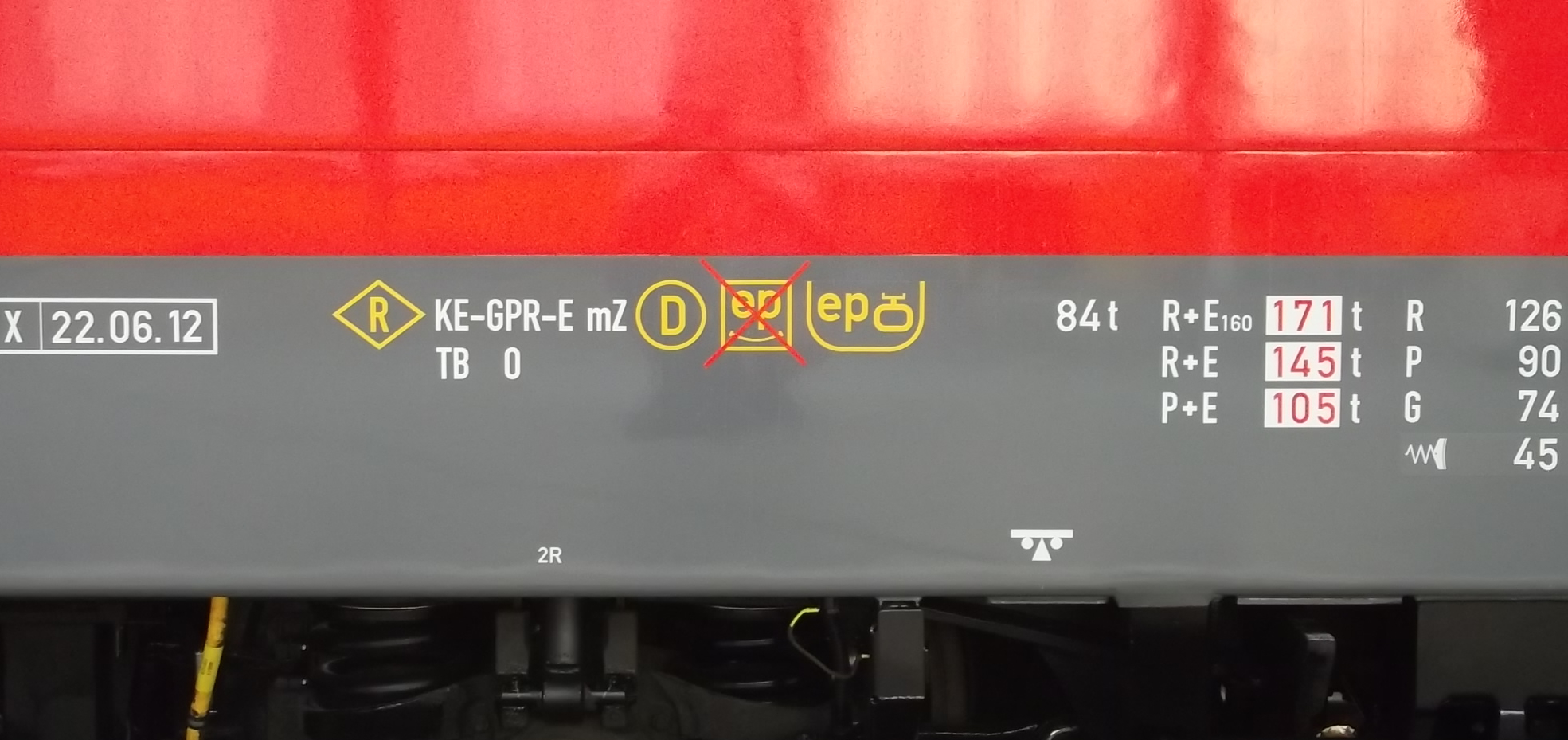 Bremsanschrift einer Lokomotive der Baureihe 146 der Deutschen Bahn